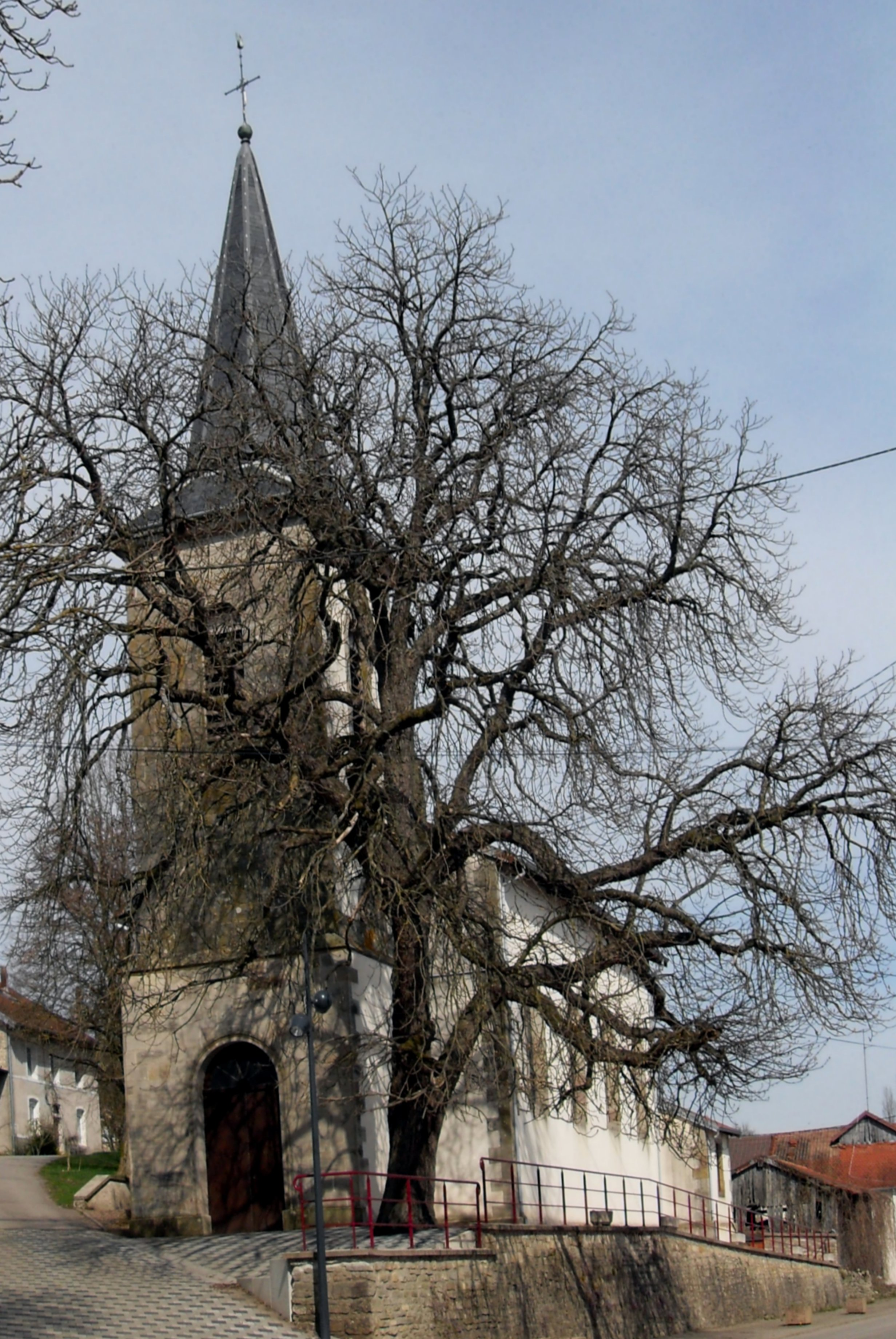 L'église Saint-Sylvestre à Villoncourt